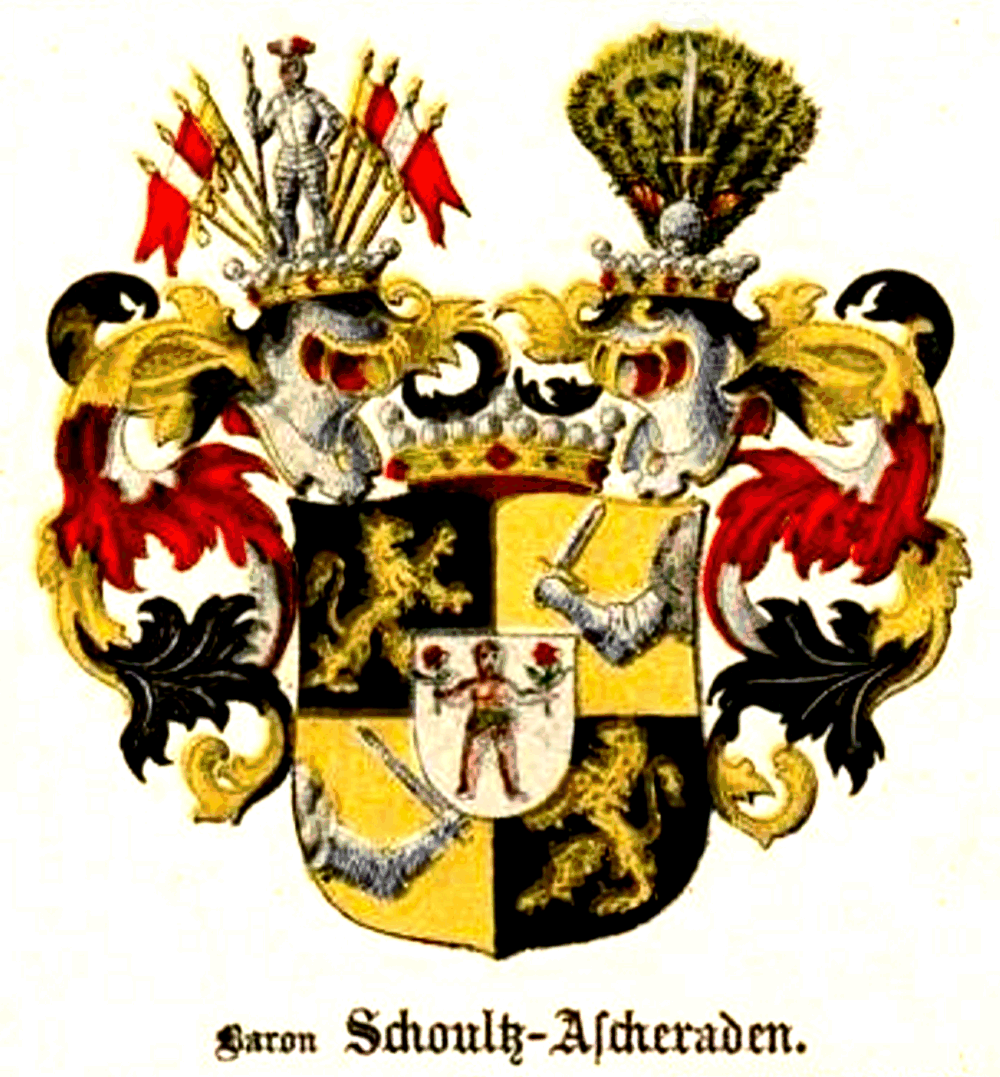 Coat pf arms of Baron Schoultz_von_Ascheraden family